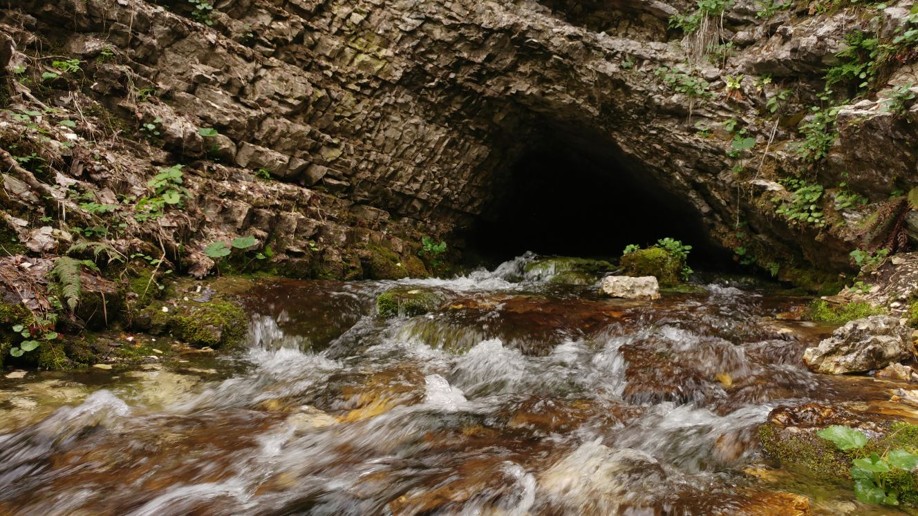 Grotta da cui sgorga la sorgente del torrente Ambro